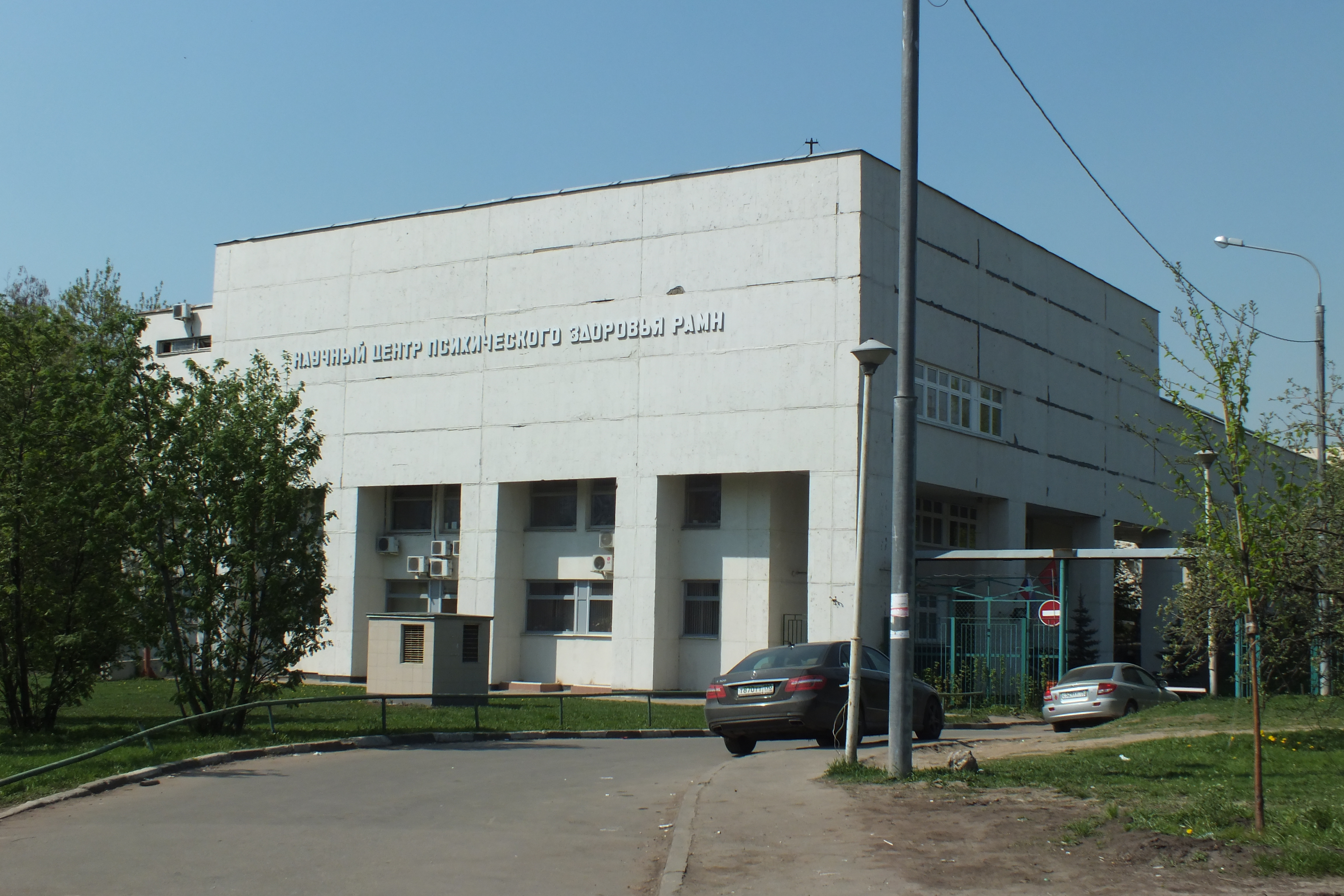 Научный центр психического здоровья РАМН на Каширском шоссе в Москве. 1 мая 2014 года